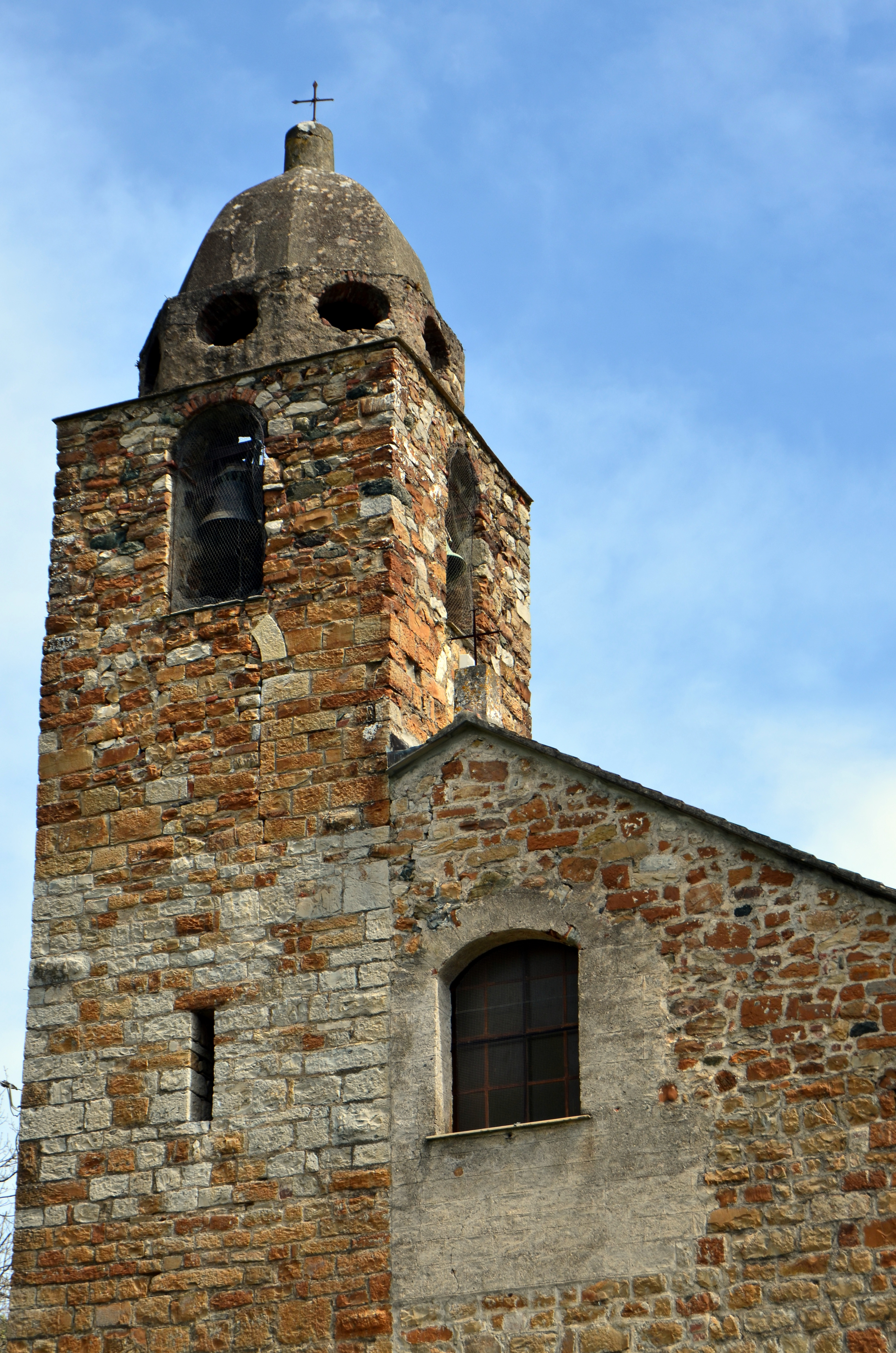 La chiesa di San Giovanni Battista, Casarza Ligure, Liguria, Italia